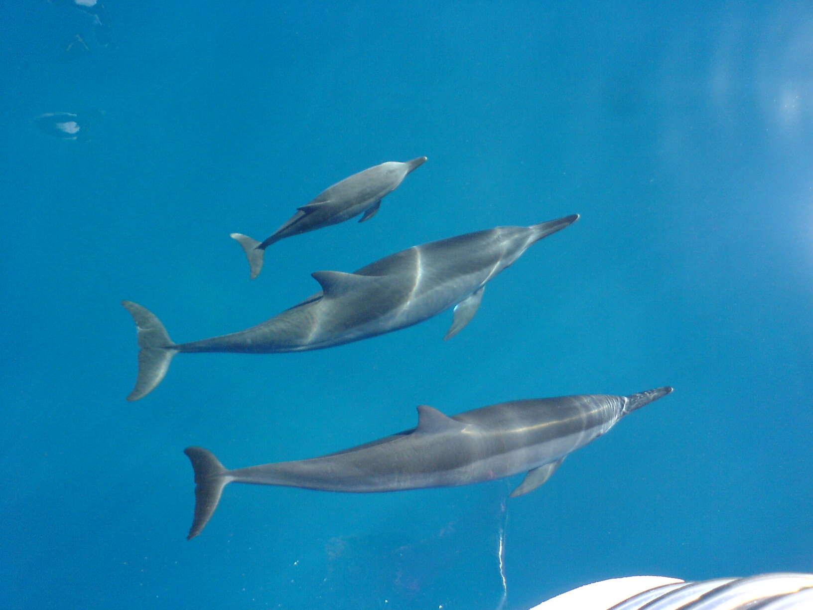 Delfines acróbata de hocico largo con cría